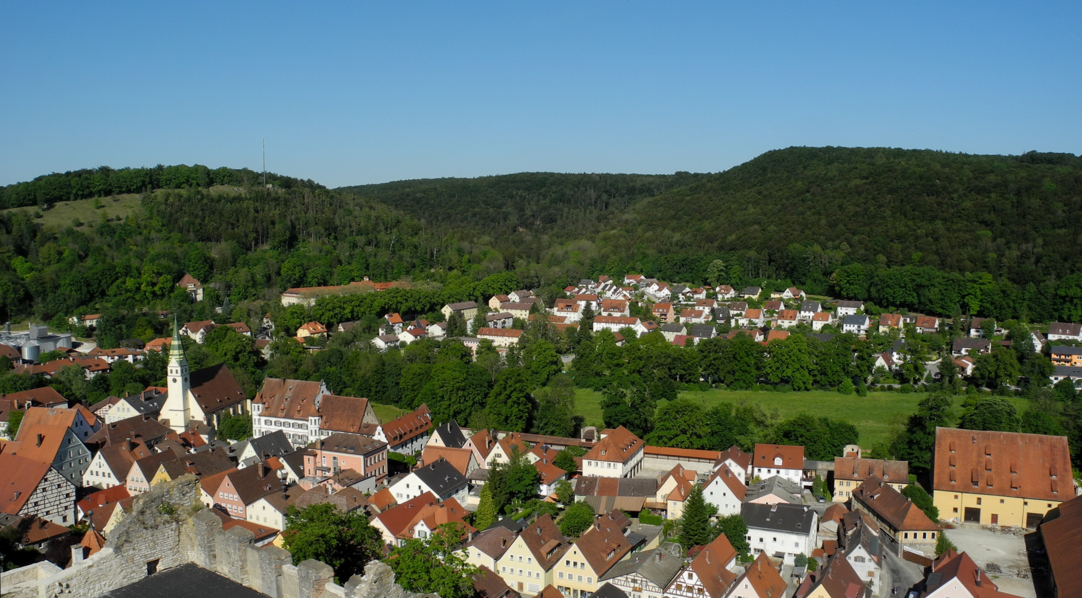 Pappenheim - Sicht von der Burg04.JPG